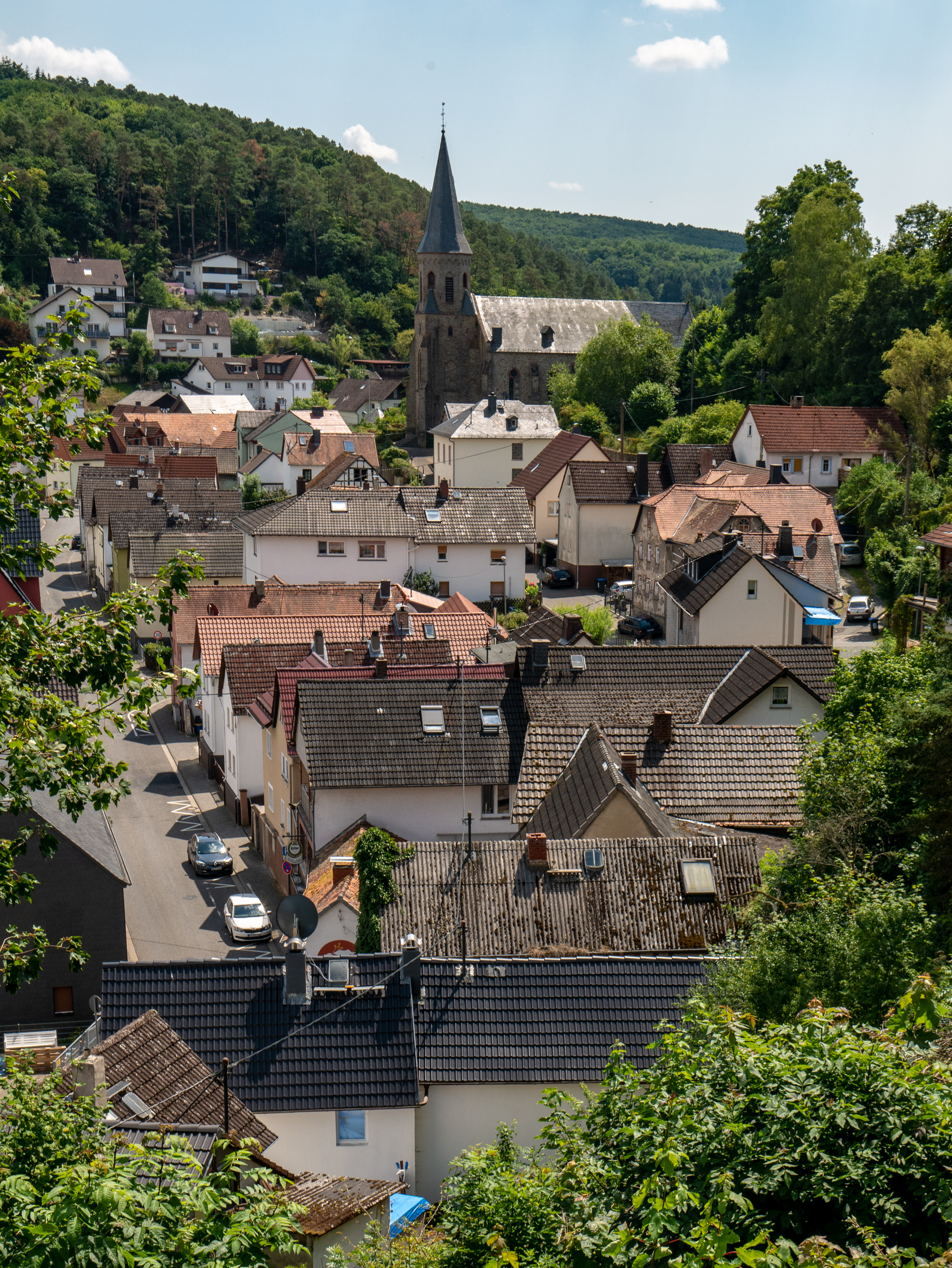 Kransberg, Usingen, Hessen